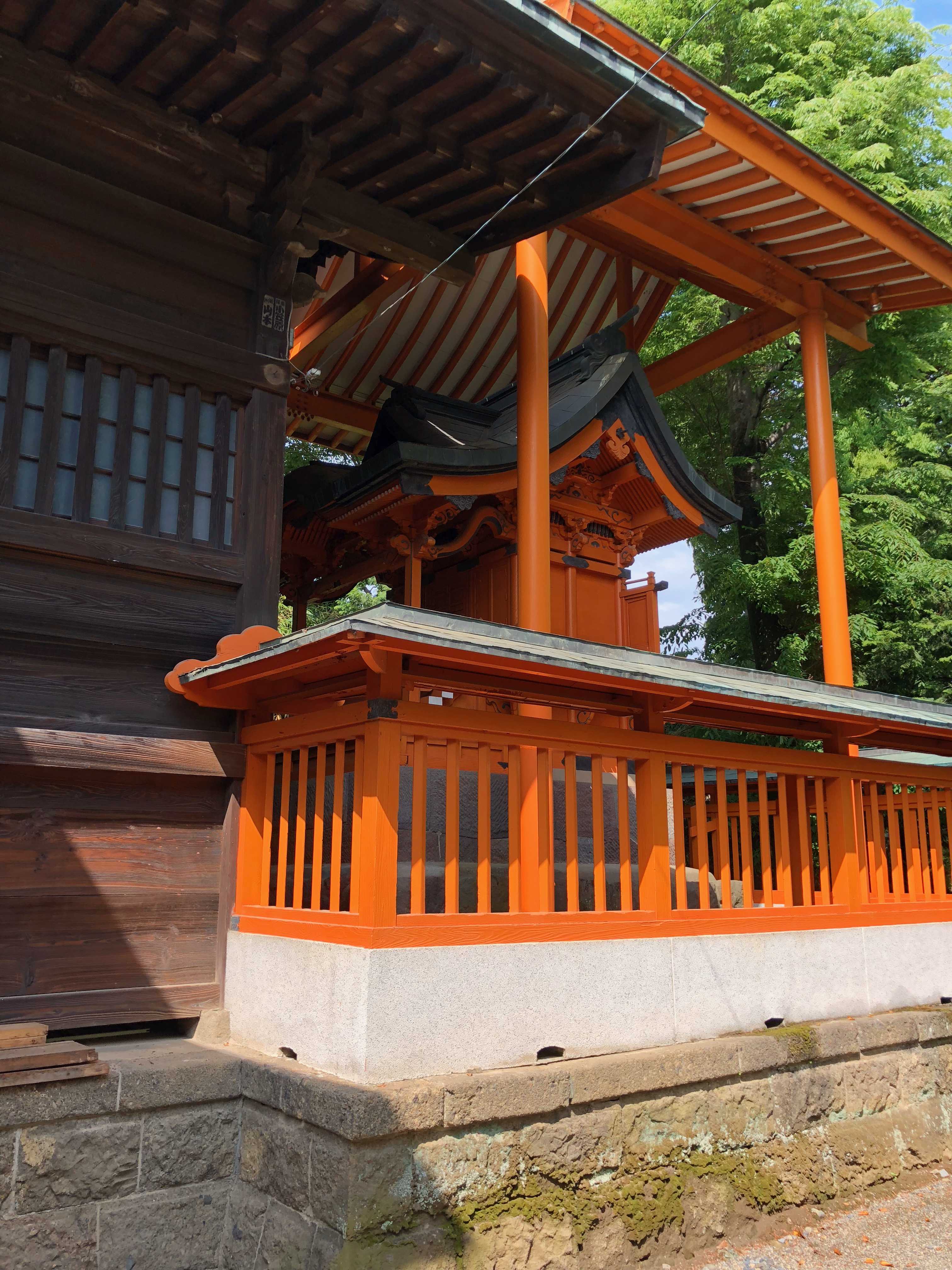 館林尾曳稲荷神社、本殿